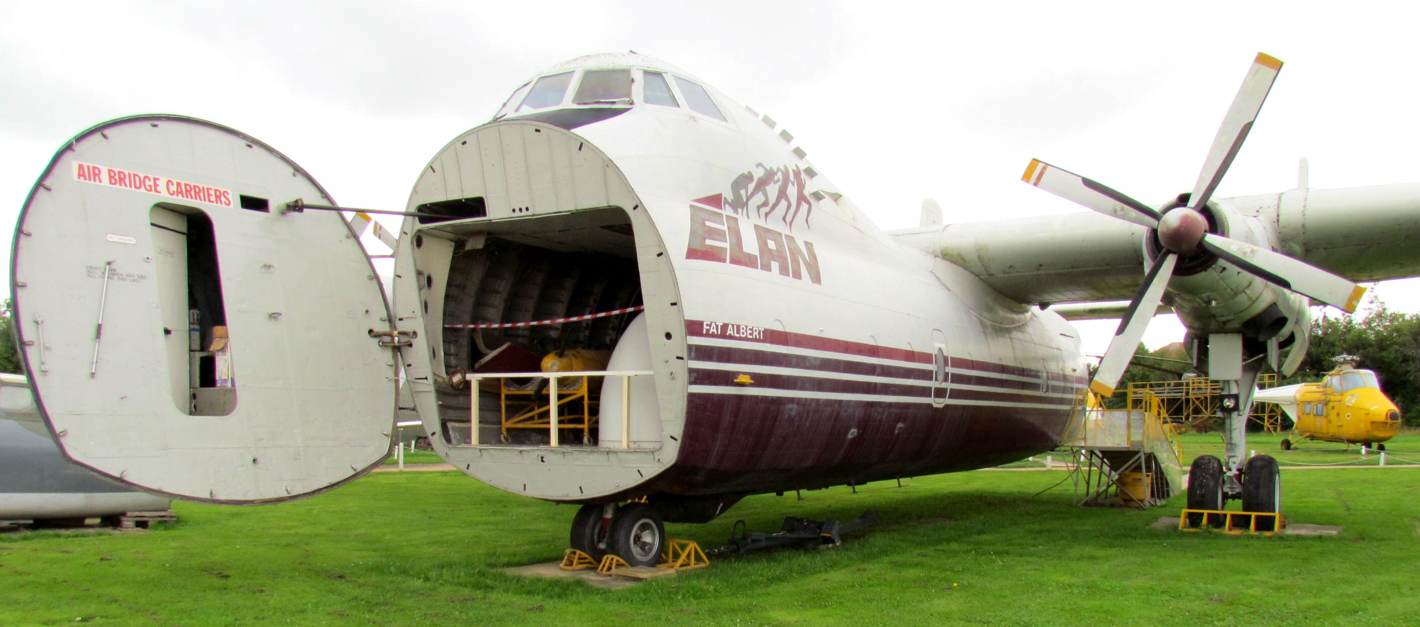 Argosy